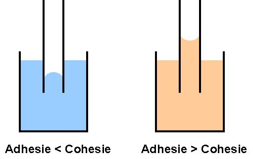 adhesie en cohesie